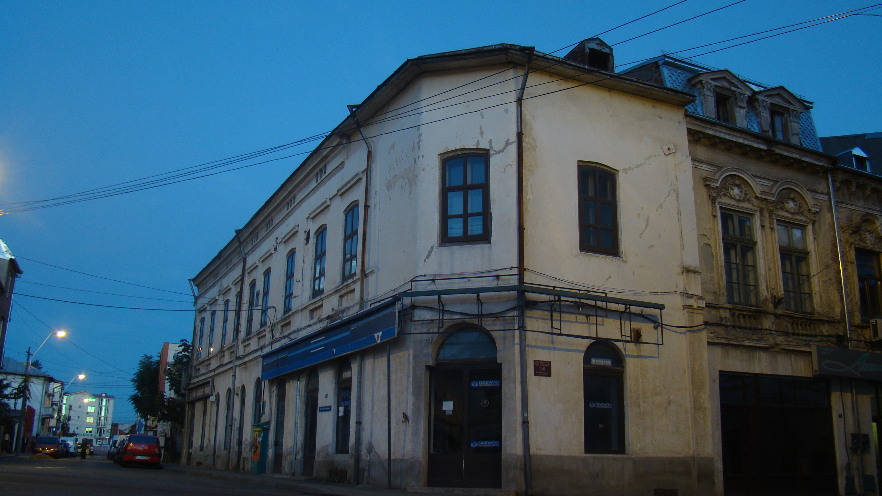 Casă str Fraţii Buzeşti nr 1